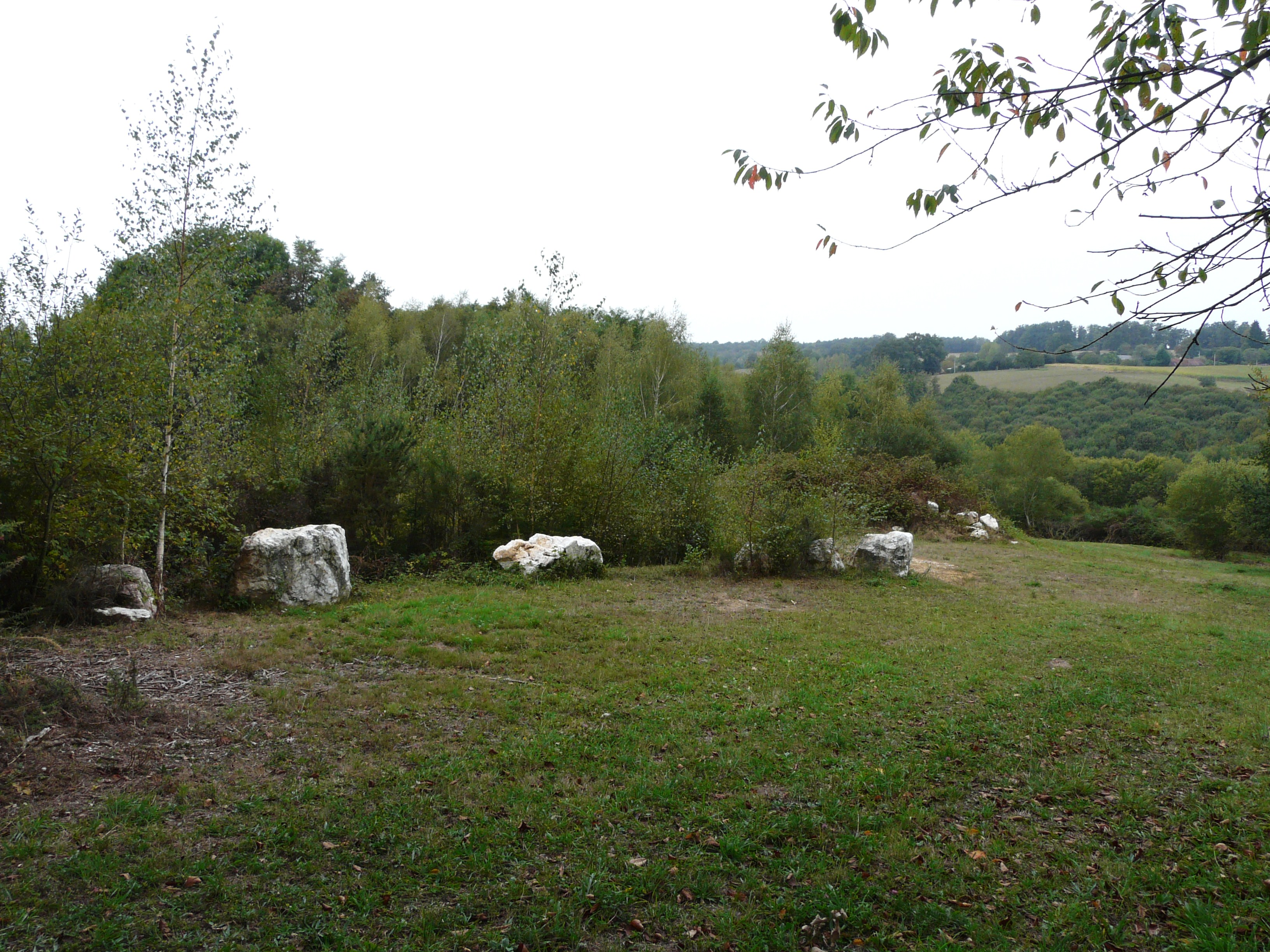 Quelque blocs épars de quartz sur le site de la Roche blanche, Saint-Paul-la-Roche, Dordogne, France